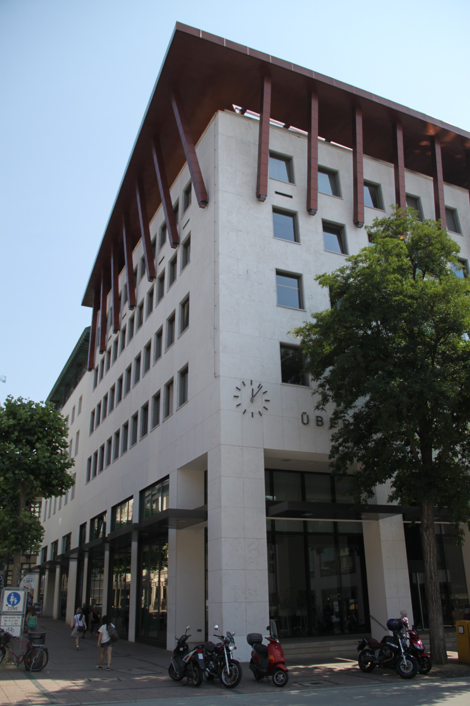 ÜWAG-Sitz Bahnhofstraße/Universitätsplatz